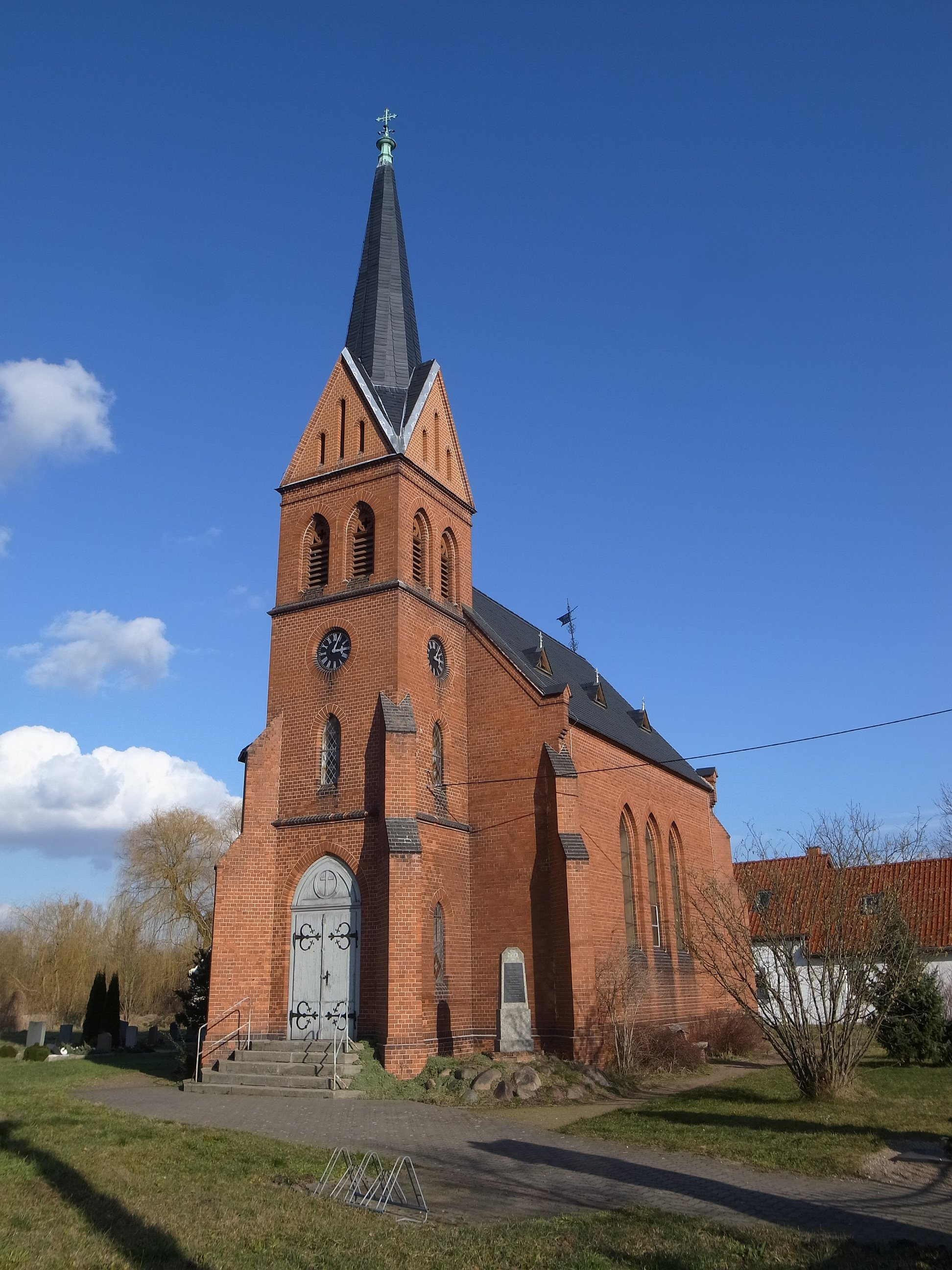 Trebbichau, Osternienburger Land, Kirche (Baudenkmal im Denkmalverzeichniss Sachsen-Anhalt, Erfassungsnummer: 094 09392 000 000 000 000 [1])